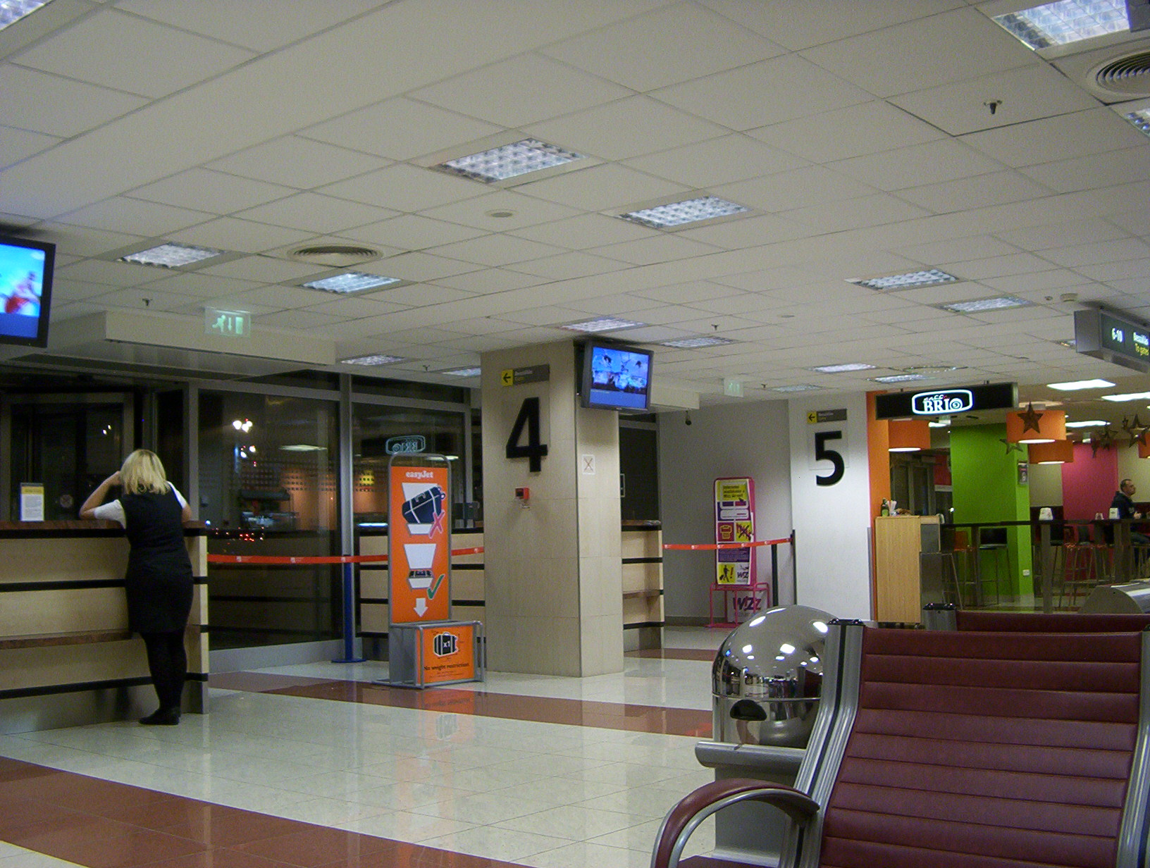 Liszt Ferenc Repülőtér 1-es terminál 4-es és 5-ös kapu